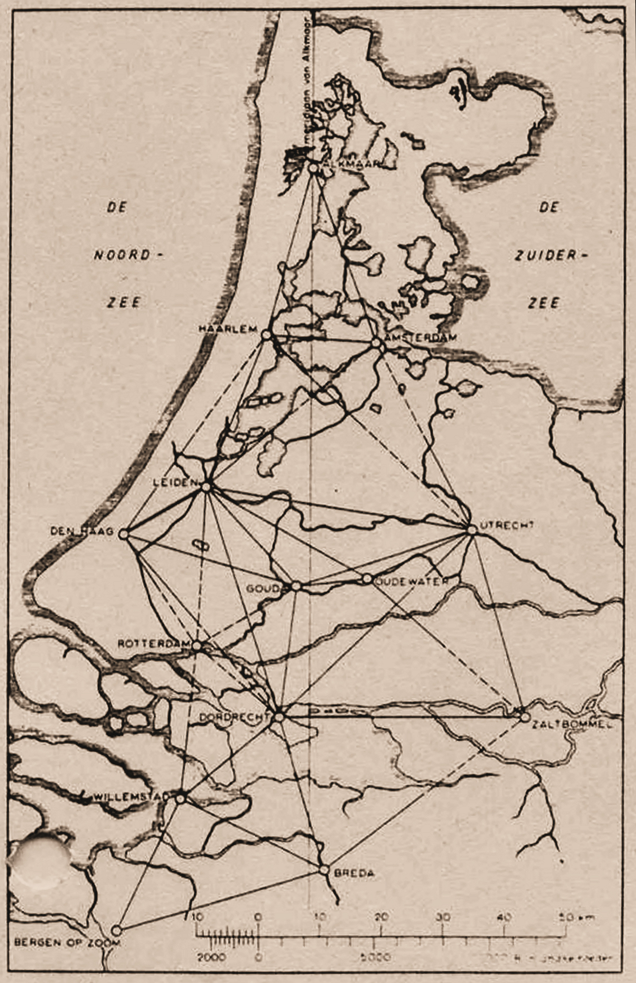 Méridienne de Snellius aux Pays-Bas.